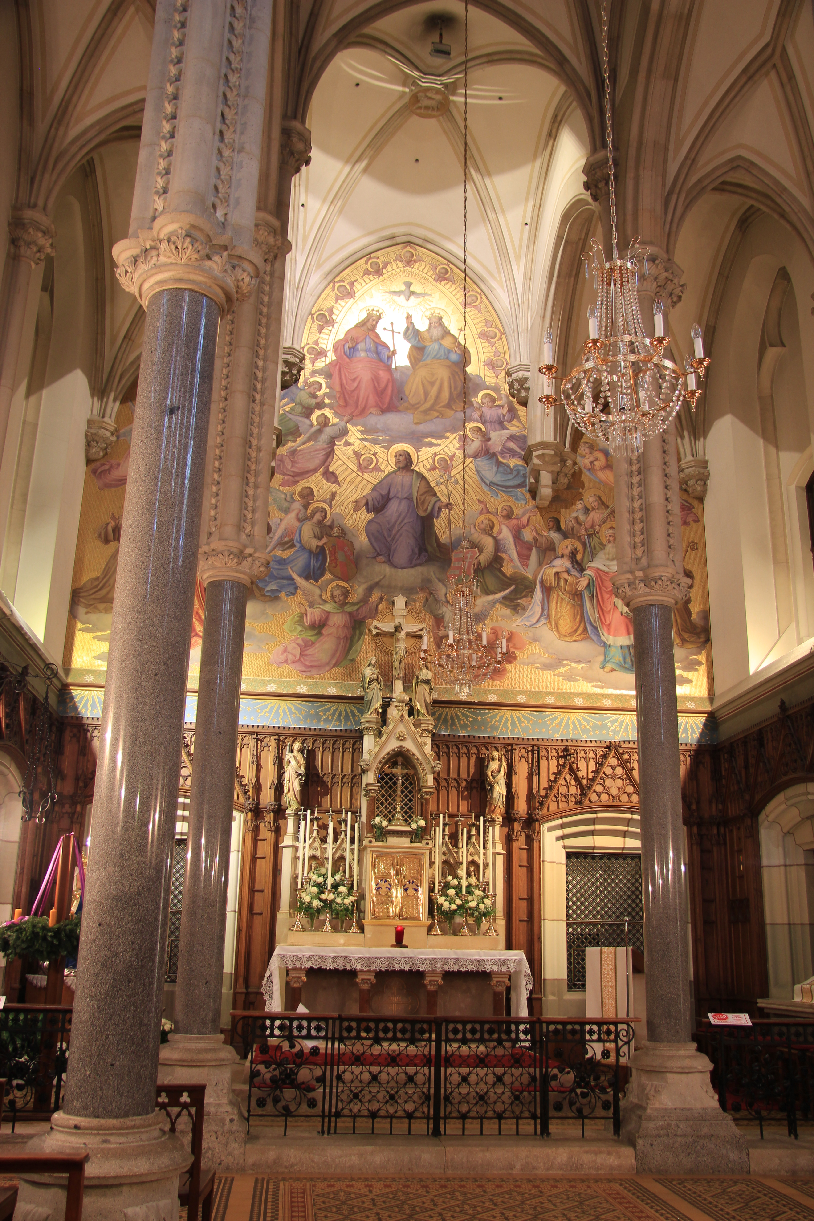 Karmel Mayerling in Niederösterreich. Altargemälde von Josef Kastner aus dem Jahre 1891.